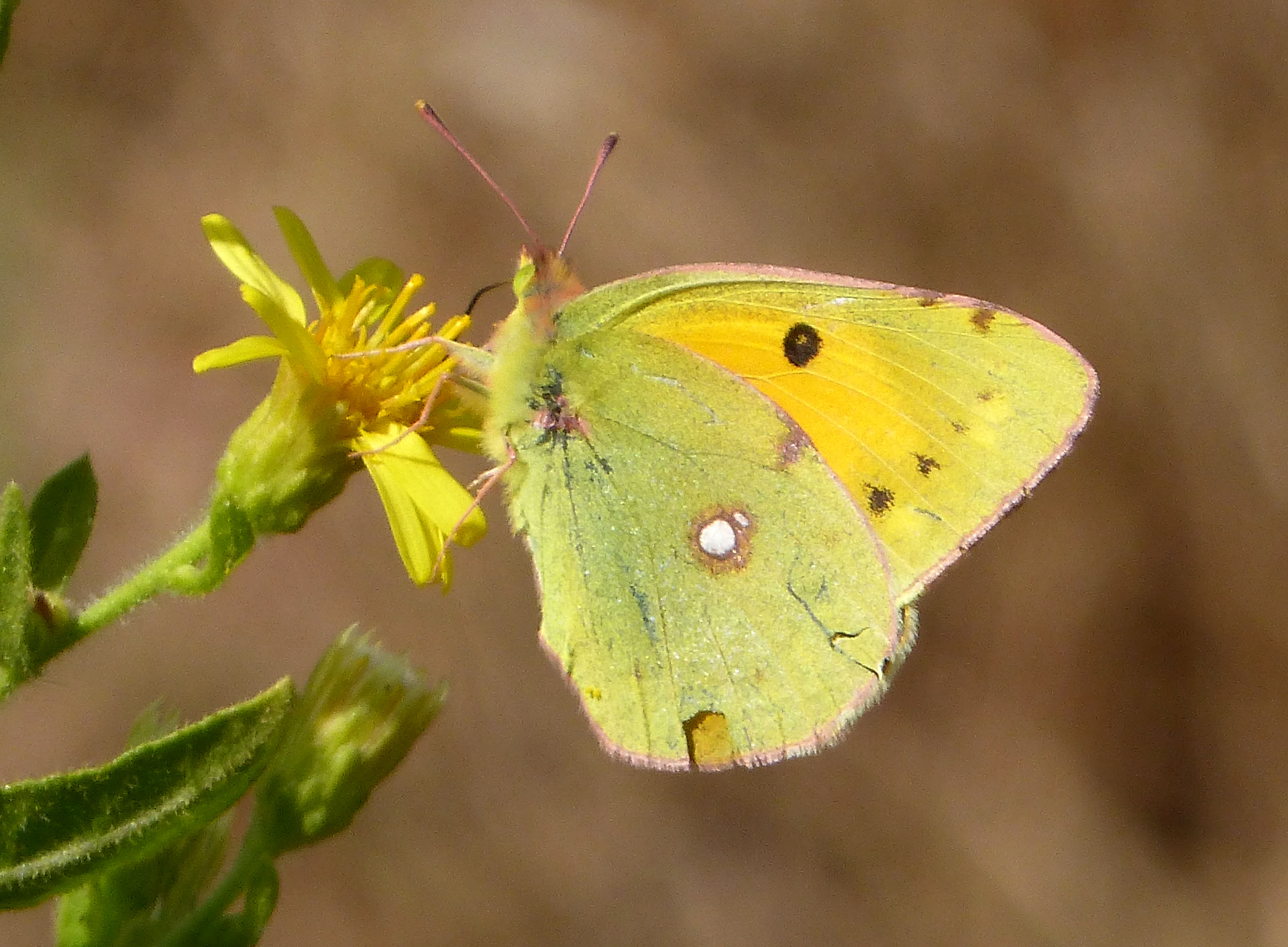 Bolonia beach, Cadiz prov. Andalucia, Spain